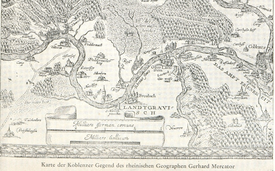 Spay, Karte von Gerhard Mercator, Norden ist rechts